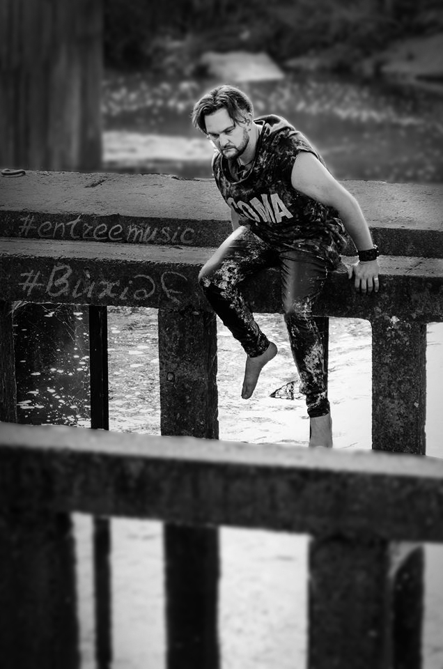 на фото Олексій Шманьов з фотосету спеціально для нового альбому Кома/Coma